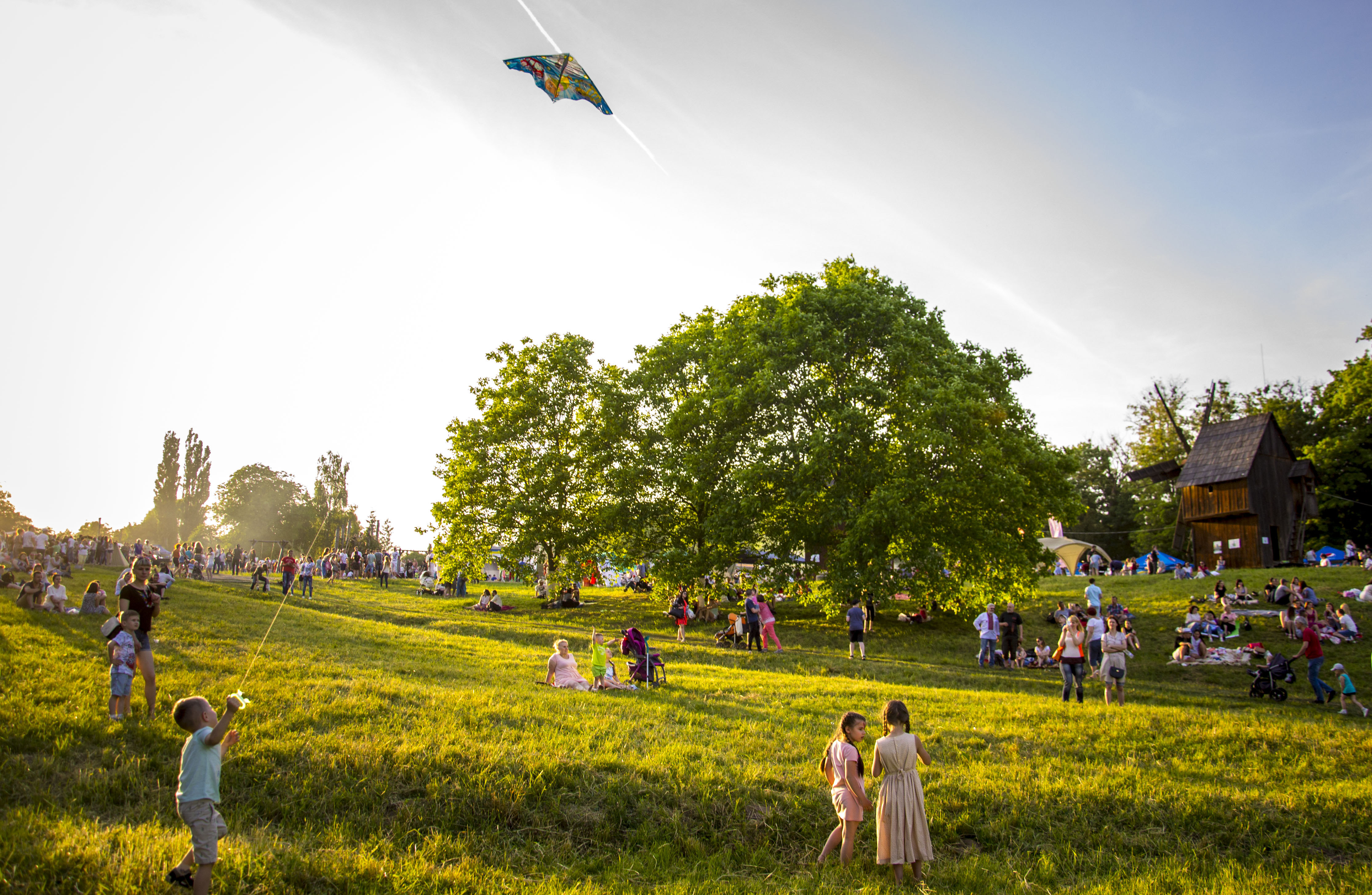 Політ. Обнова-фест 2017 (автор Р. Козлов)